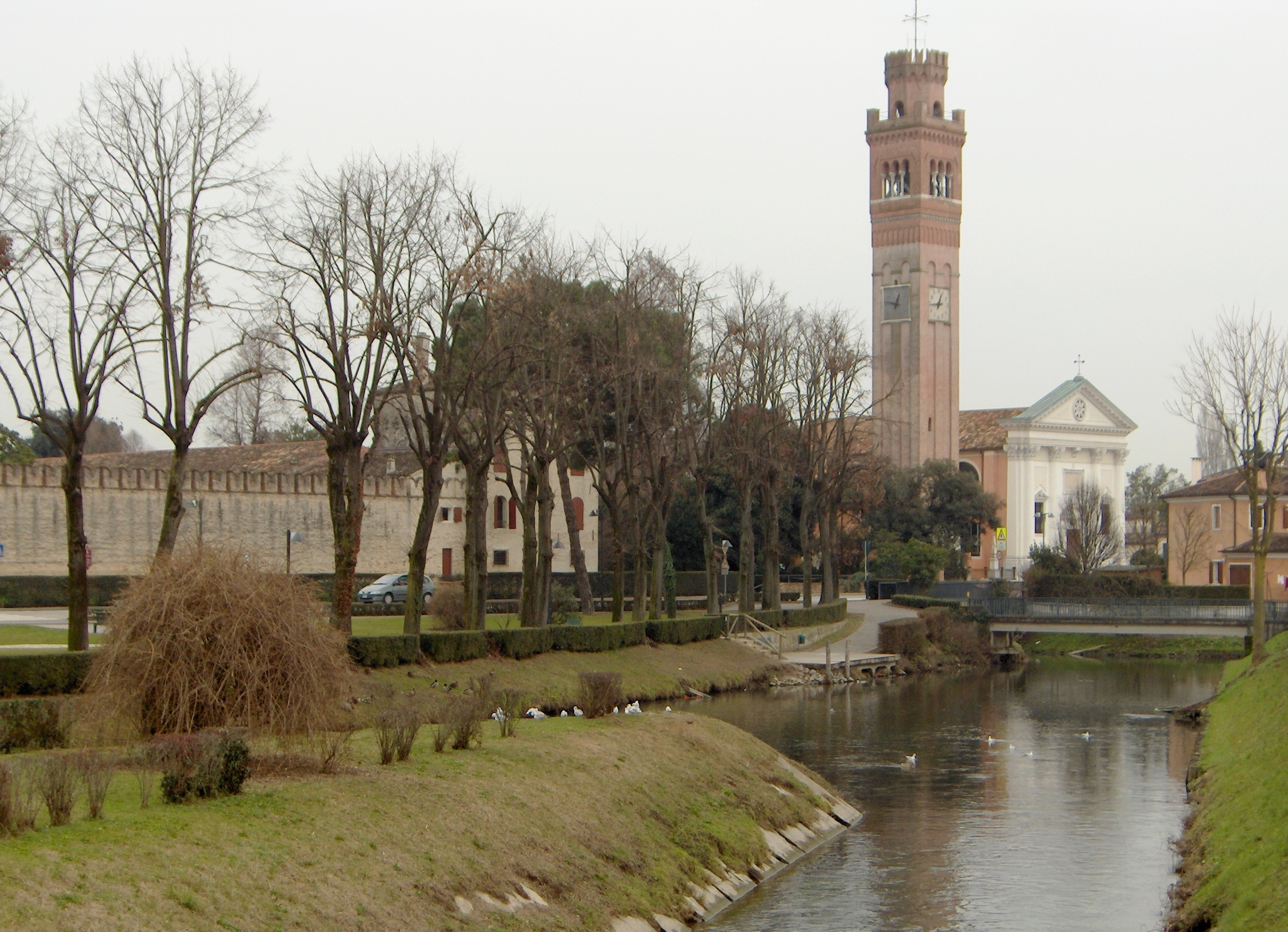 Veduta città di Roncade